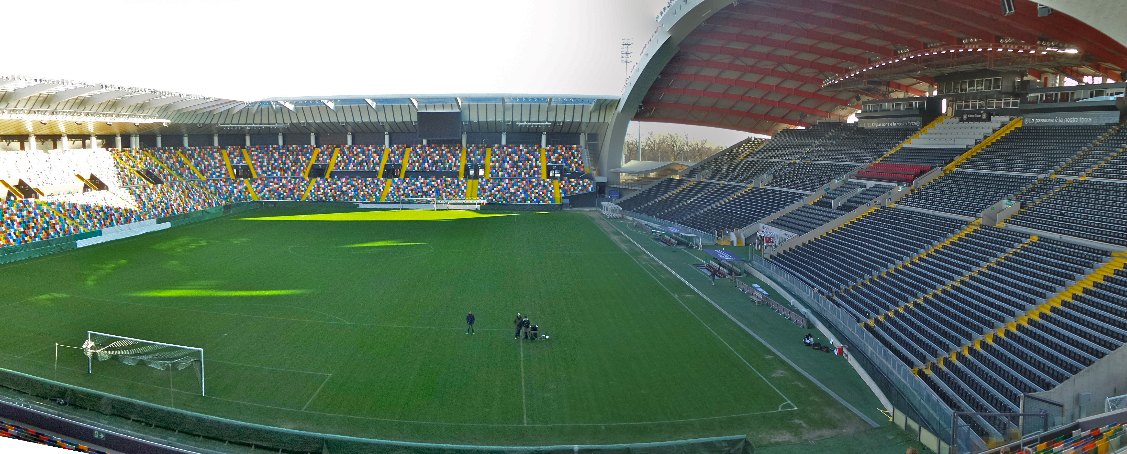 Veduta dello Stadio Friuli nel 2016 dalla Curva Nord